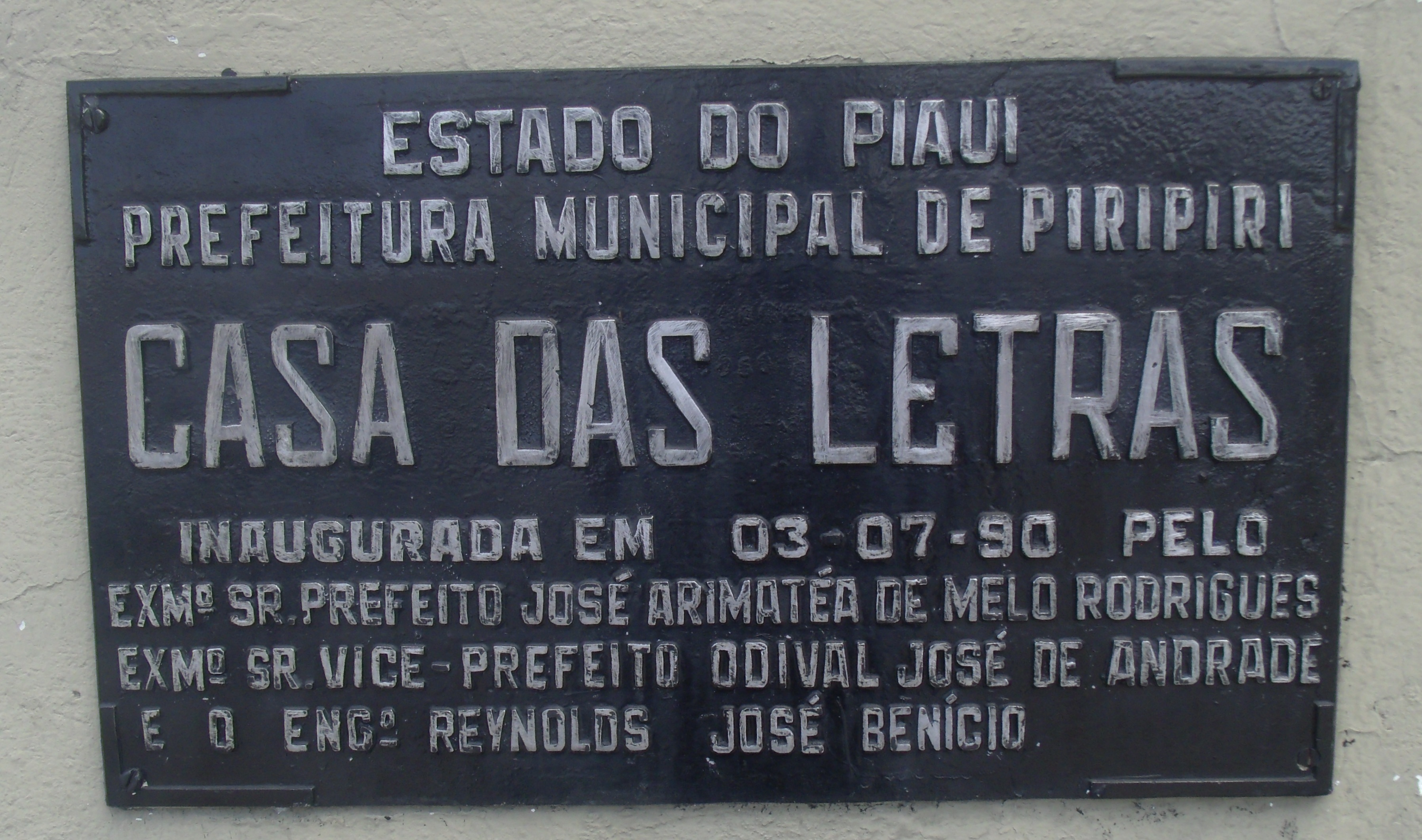 Placa de reforma dos anos 90 da Biblioteca Municipal Casa das Letras em Piripiri, no estado brasileiro do Piau.